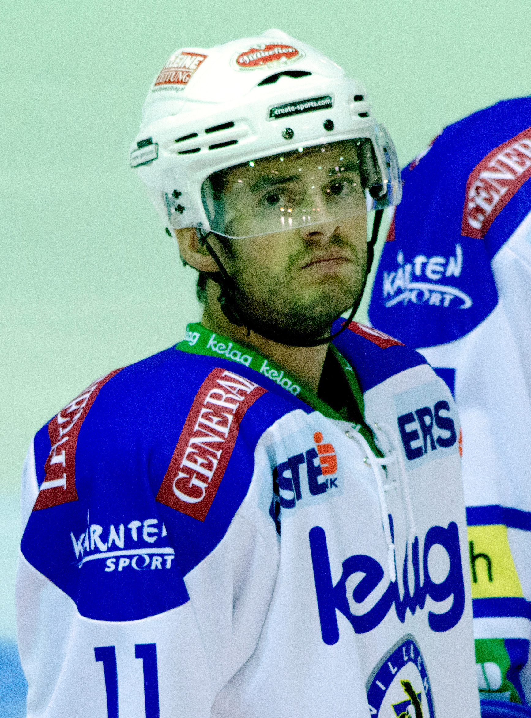 Derek Ryan before 300. Kärtner Derby, 15. September 2013